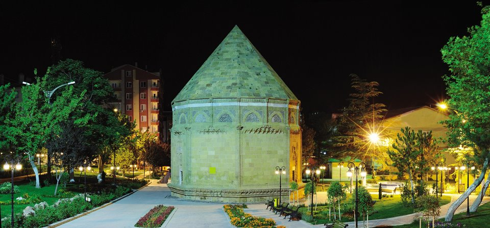 Niğde Hüdâvend Hatun Kümbeti UFUK MERAL